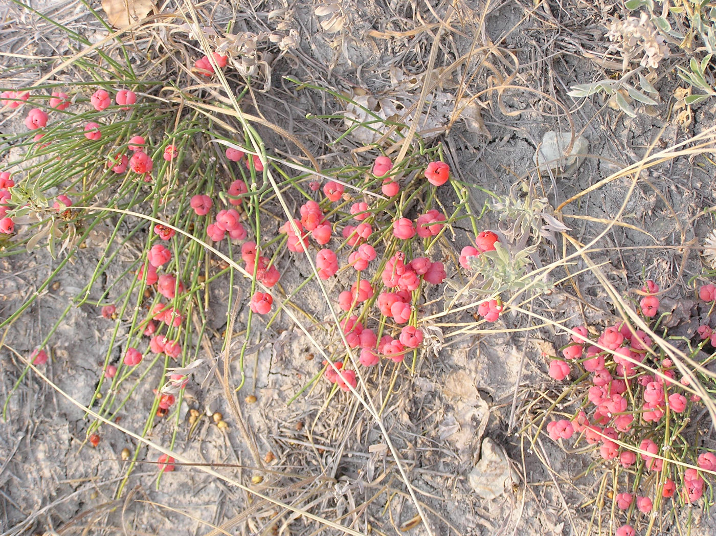 Ephedra distachya in habitat. Saratov Oblast, Russia.